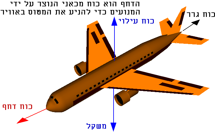 כוח הדחף במטוס